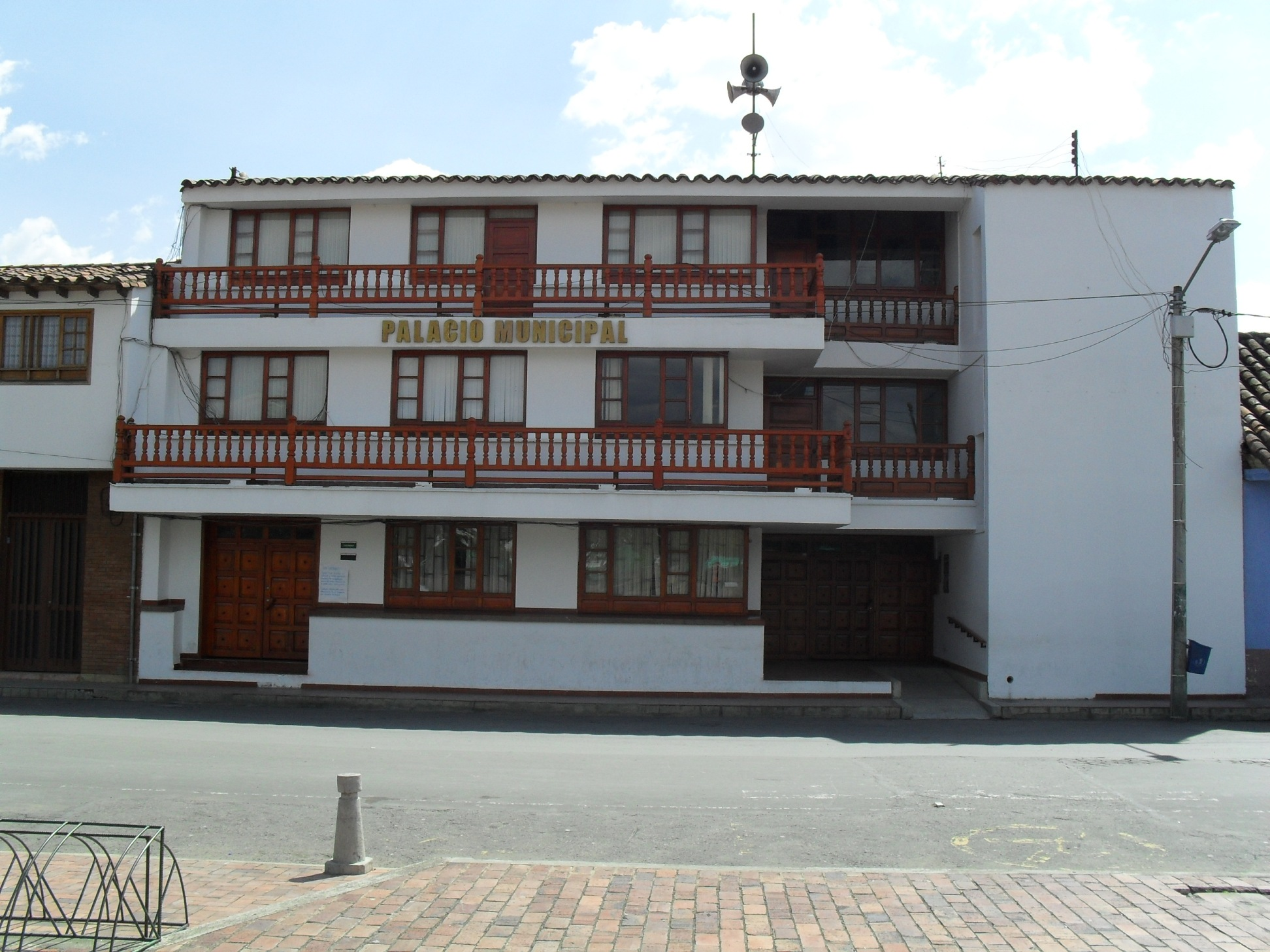 Palacio Municipal (alcaldía) del municipio de Simijaca, Cundinamarca, Colombia